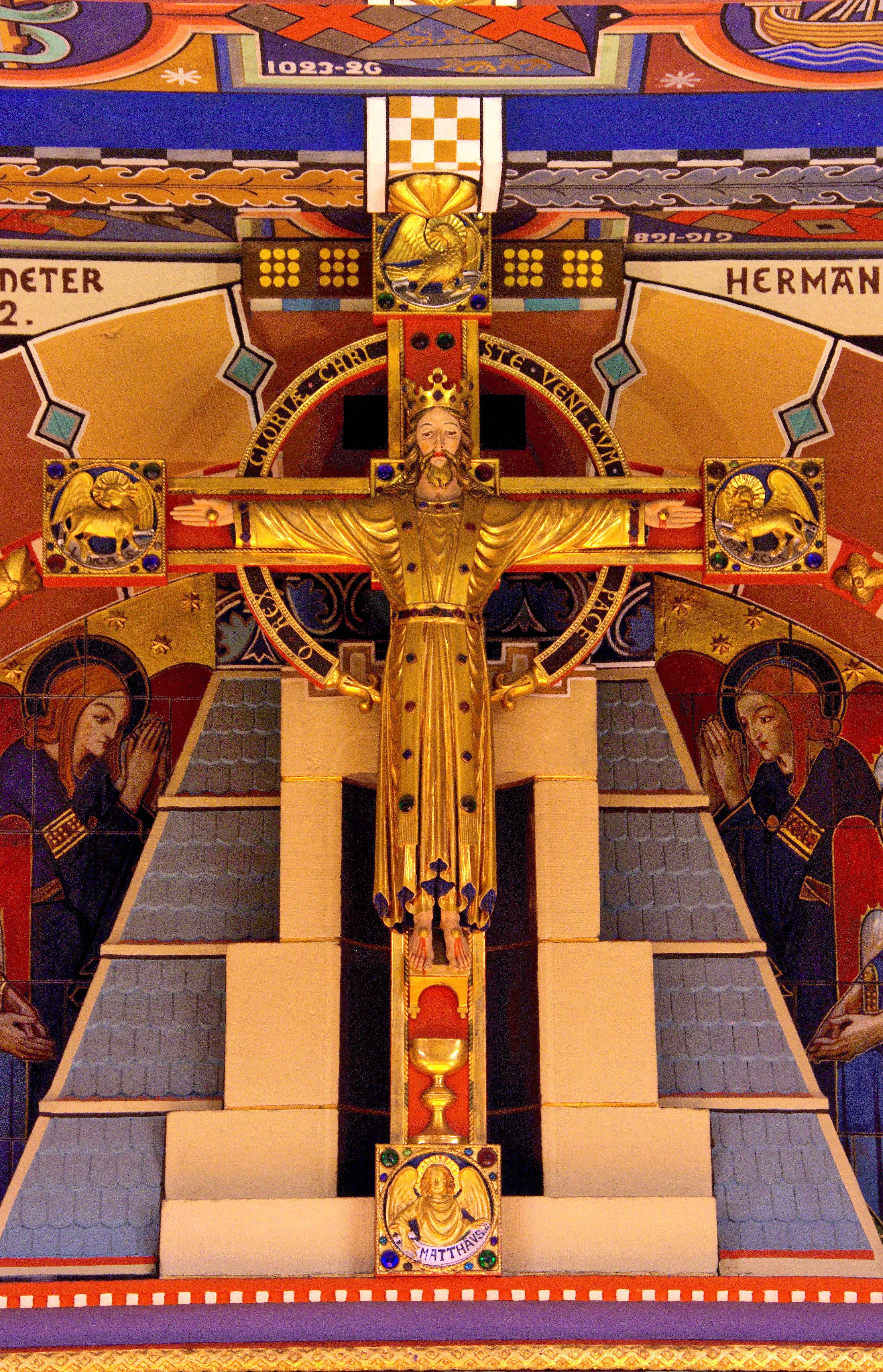 Erzbischöfliches Ordinariat Freiburg: Kreuz von Joseph Dettlinger im Sitzungssaal